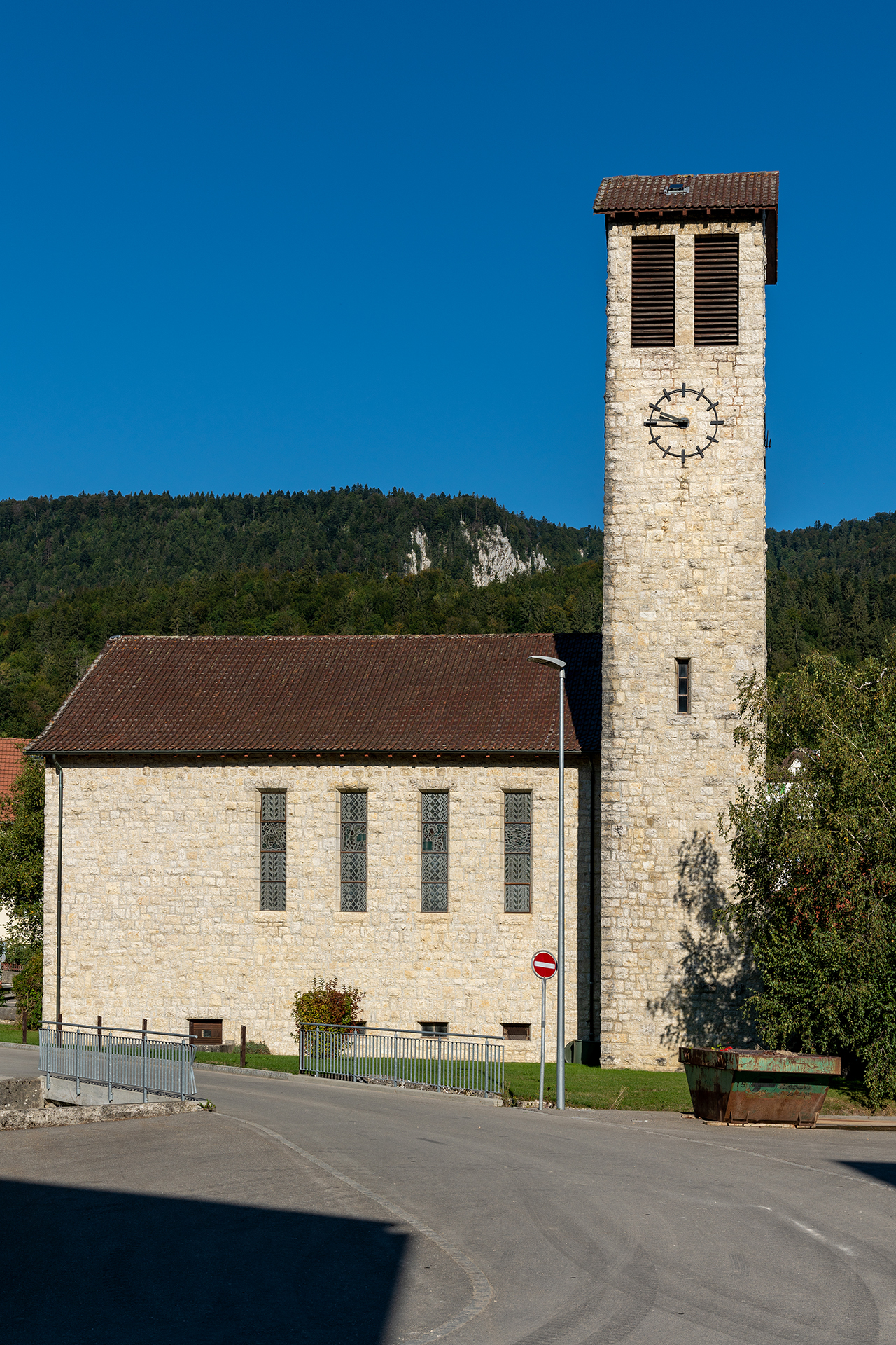 Kirche in Villeret (BE)